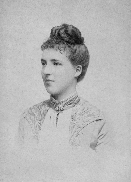 Die spätere portugiesische Königin Amélie (1865-1951)